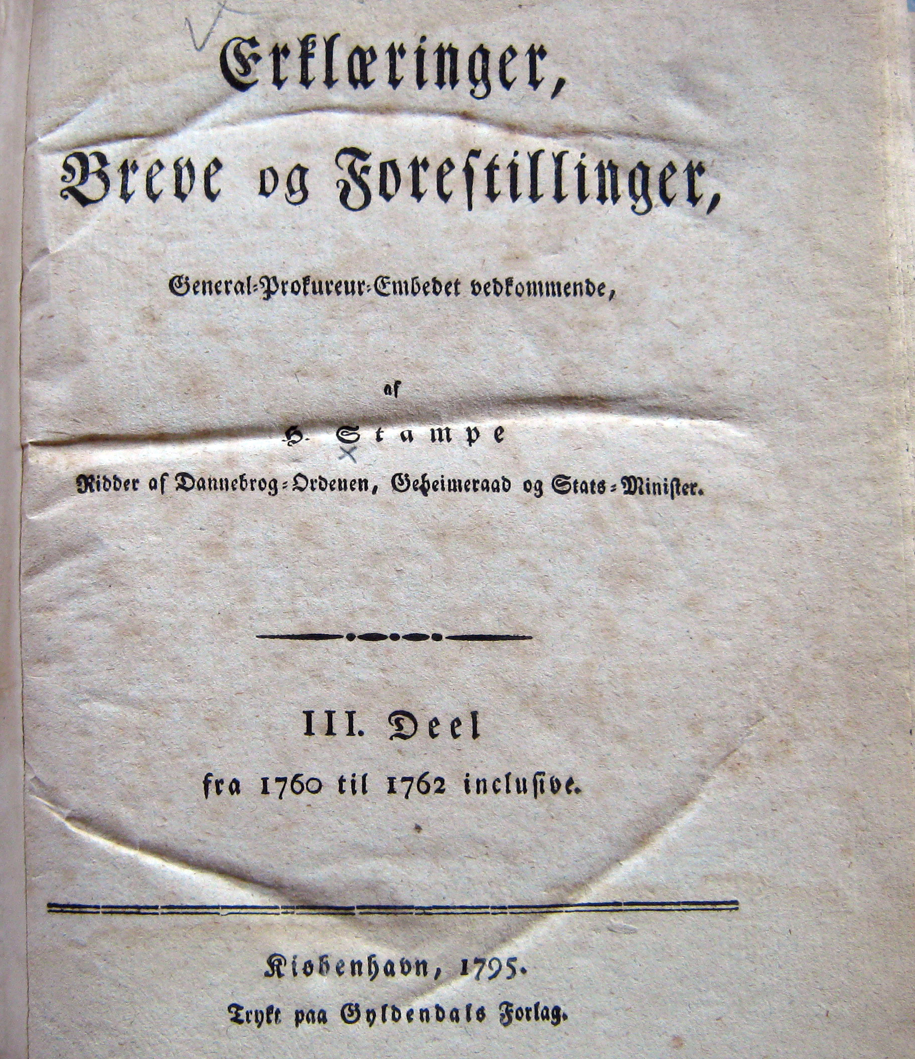 Titelbladet til 3. bind af Henrik Stampes Erklæringer, Breve og Forestillinger, Generalprokurørembedet vedkommende fra 1795.